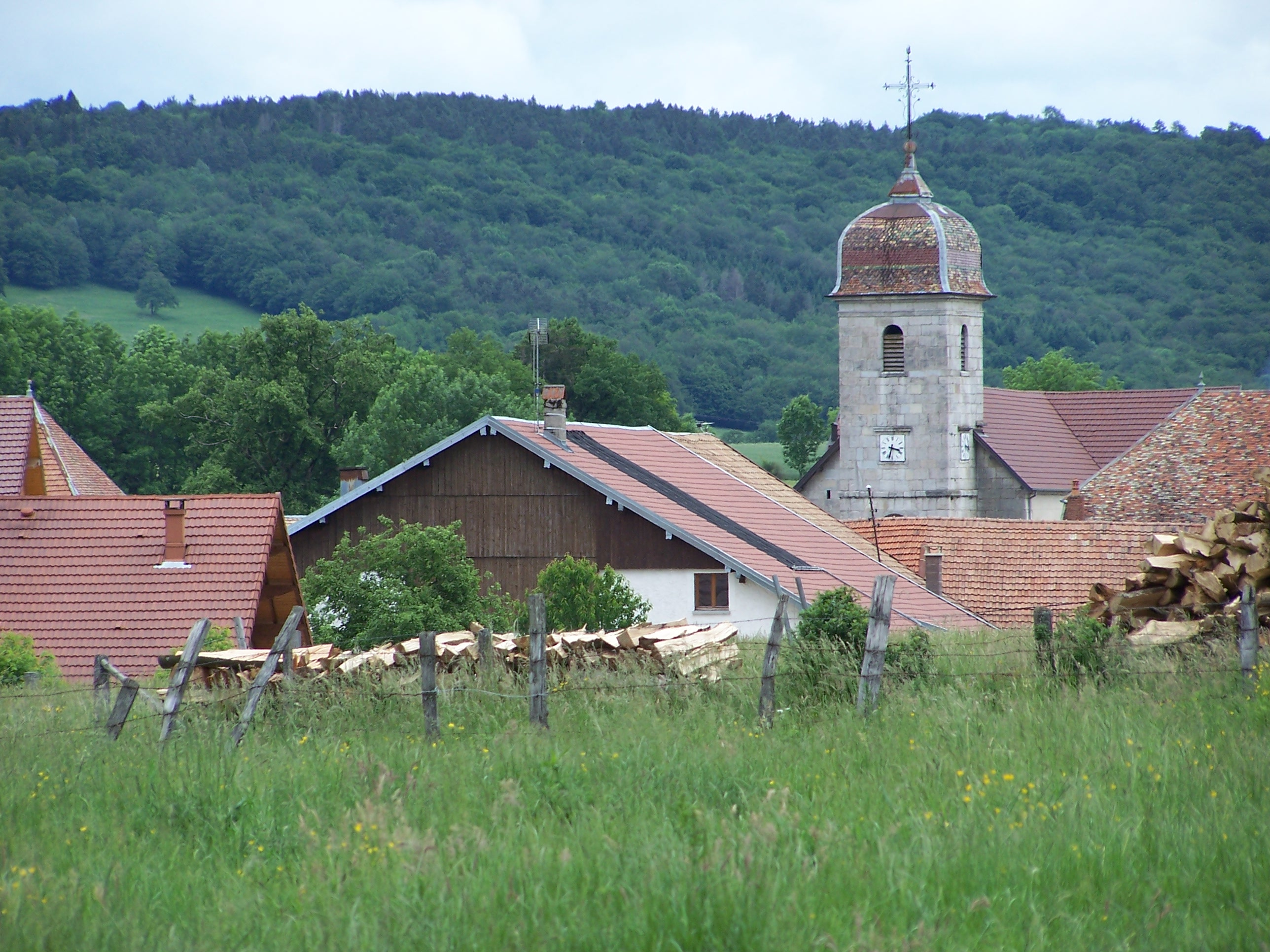 Description Entrée Nord du village, en venant de Belmont DateMay 2007SourceOwn workAuthorSamuel MorePermission (Reusing this file) Voir licence dans la liste déroulante Other versions (facultatif s'il n'y a pas d'autres versions de l'image) Entrée Nord du village, en venant de Belmont